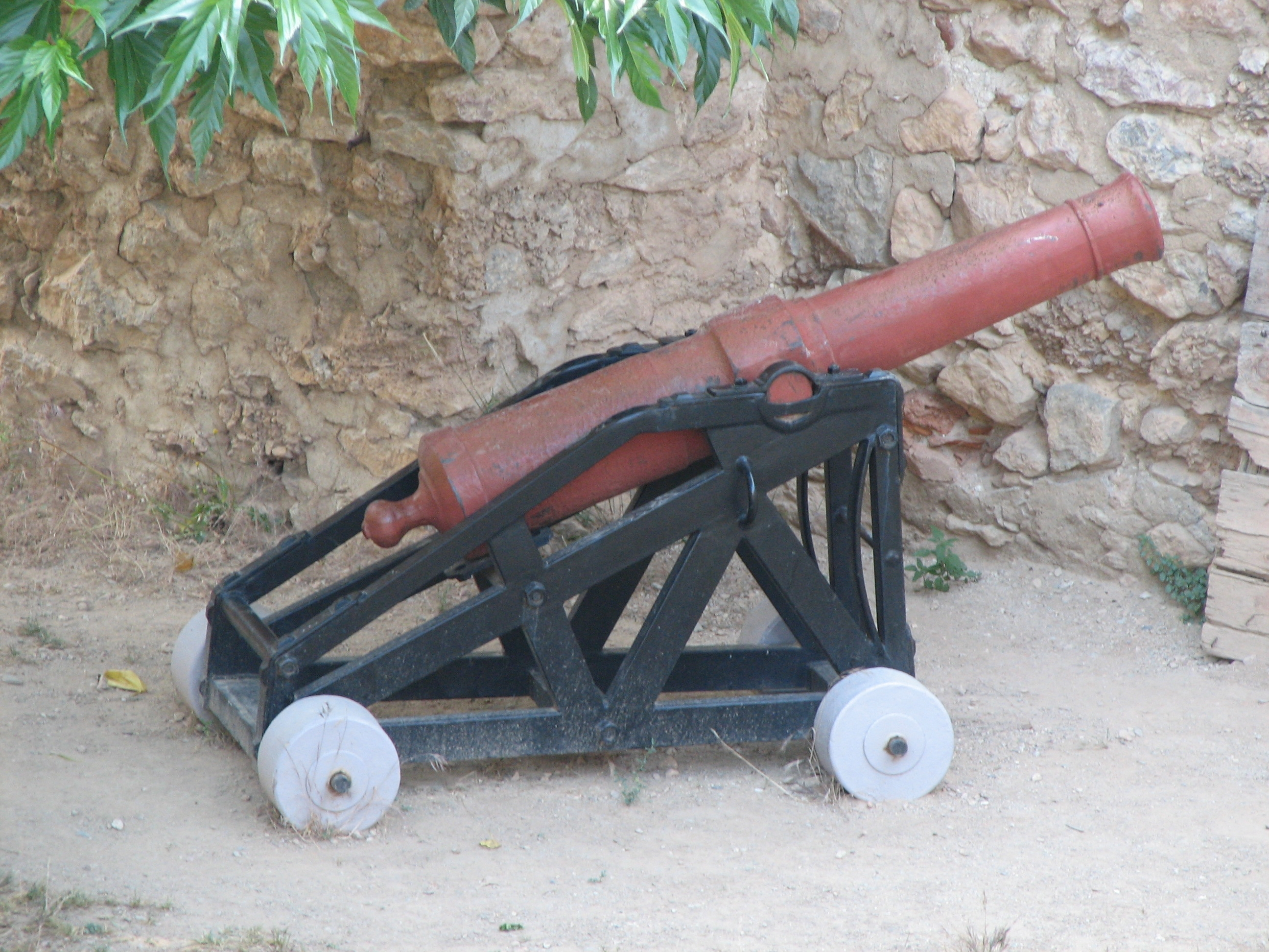 Fort Libéria: Kanone mit einer Reichweite von ca. 4km